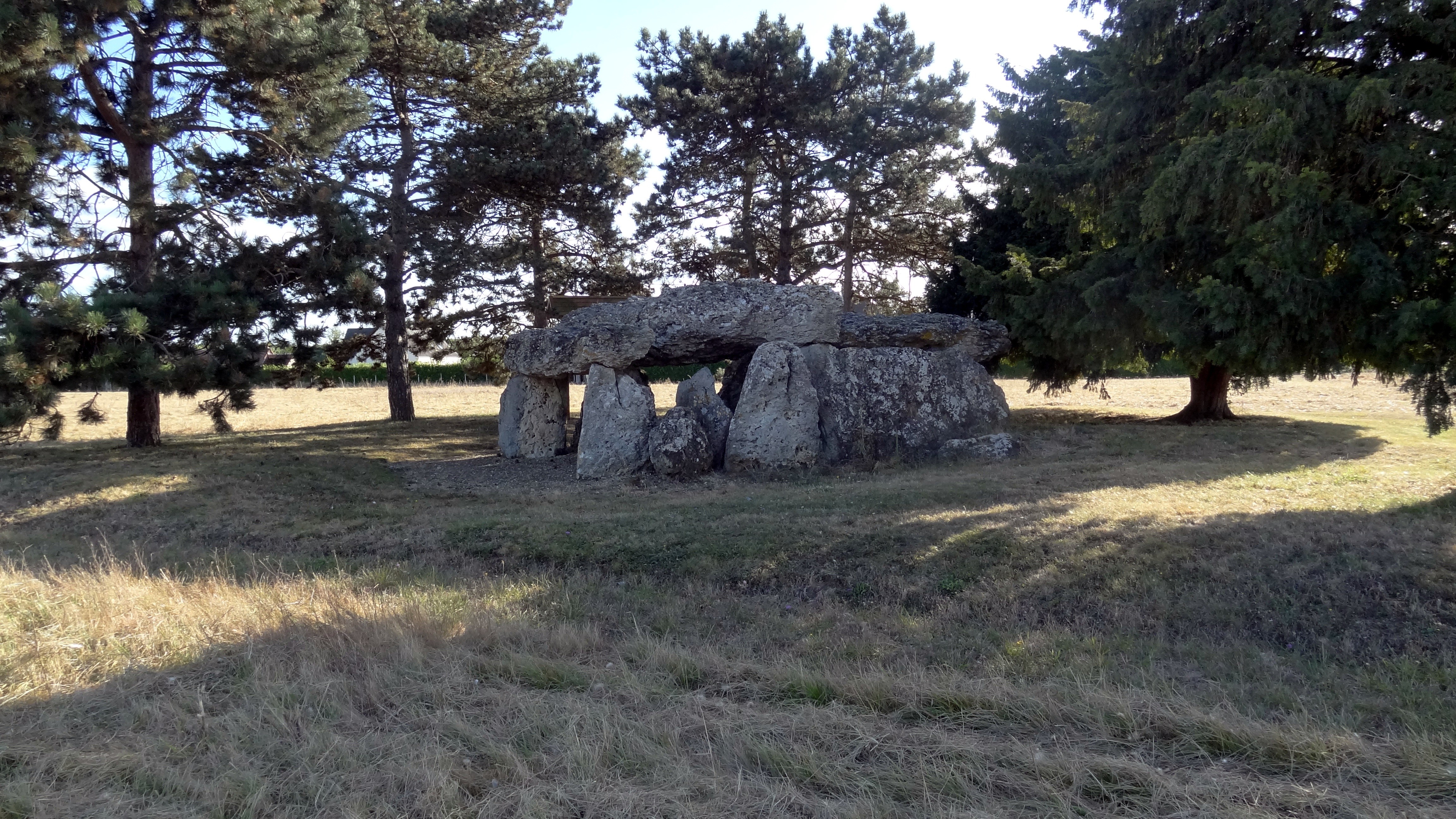 Dolmen de la Pierre Levée, La Chapelle-Vendômoise, Loir-et-Cher, France. .